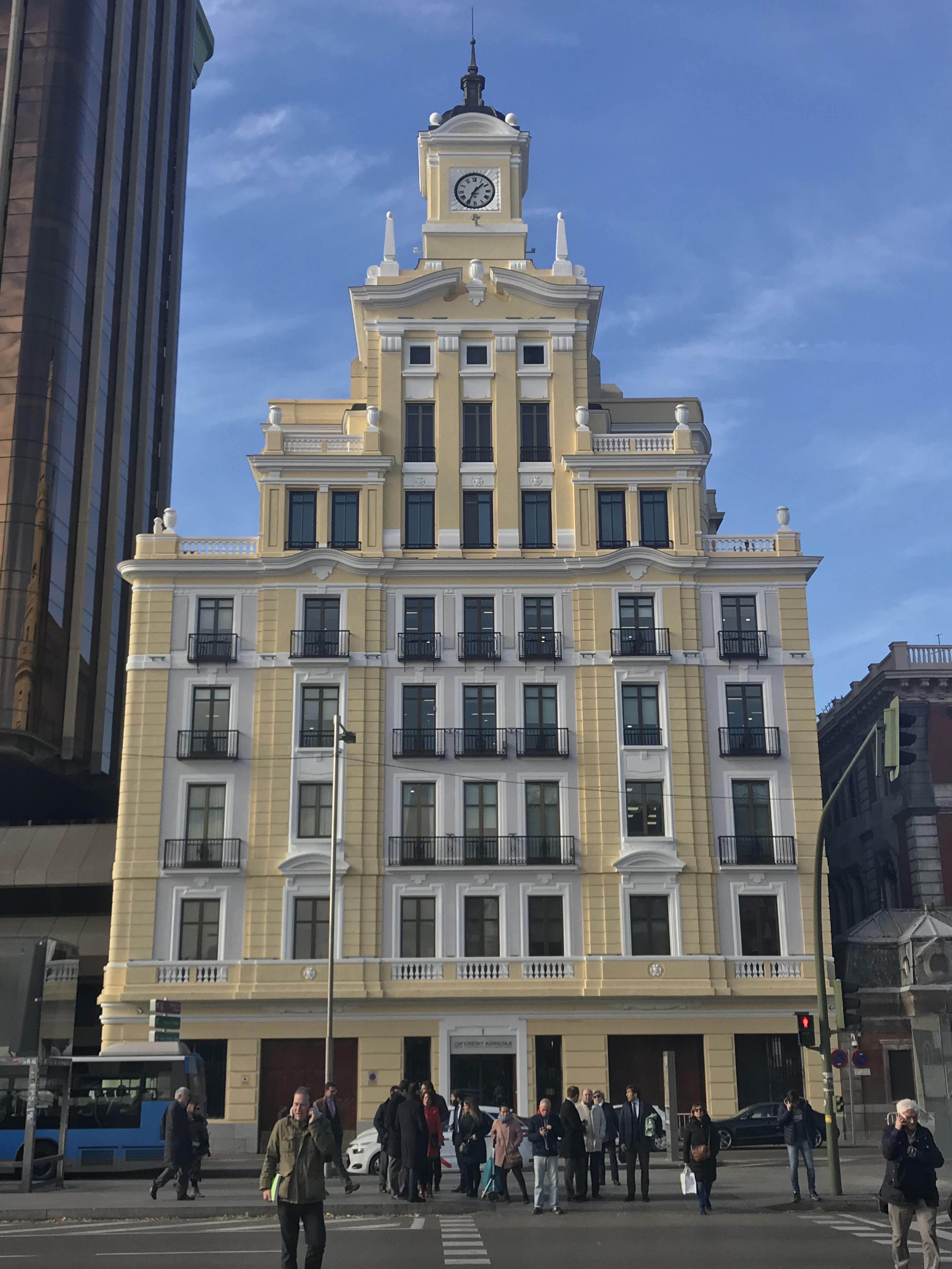 Edificio Crédit Agricole IndoSuez